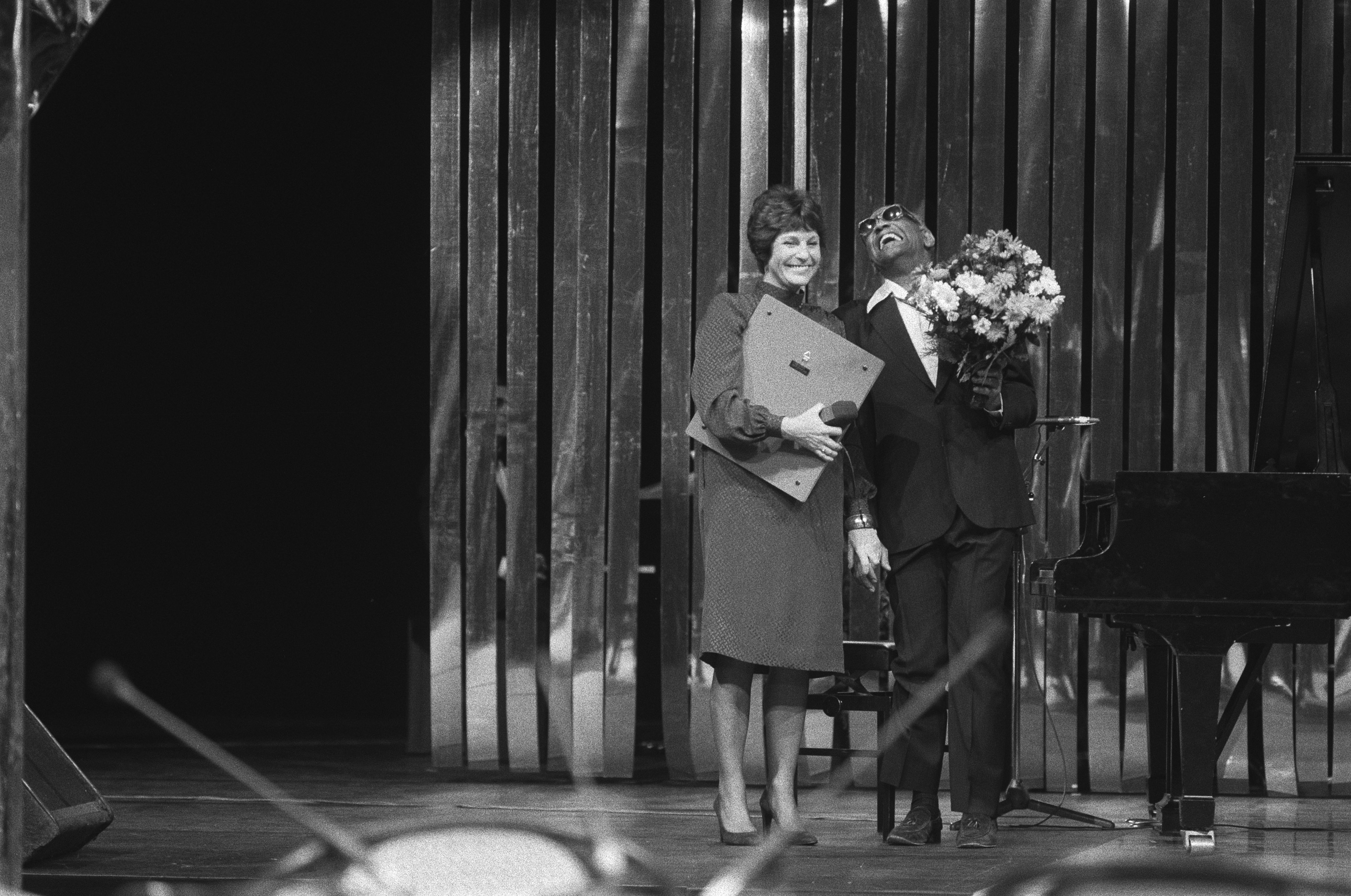 Collectie / Archief : Fotocollectie Anefo Reportage / Serie : Televisieprogramma "Mies" van Mies Bouwman meest bekeken programma Beschrijving : Mies Bouwman reikt een gouden plaat uit aan Ray Charles Datum : 18 november 1981 Trefwoorden : televisiepresentatrices, televisieprogramma's, zangers Persoonsnaam : Bouwman, Mies, Charles, Ray Fotograaf : Dijk, Hans van / Anefo Auteursrechthebbende : Nationaal Archief Materiaalsoort : Negatief (zwart/wit) Nummer archiefinventaris : bekijk toegang 2.24.01.05 Bestanddeelnummer : 931-8108